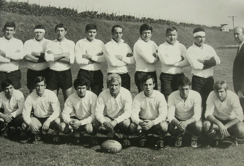 Match Fumel Dax 1969 à Dax